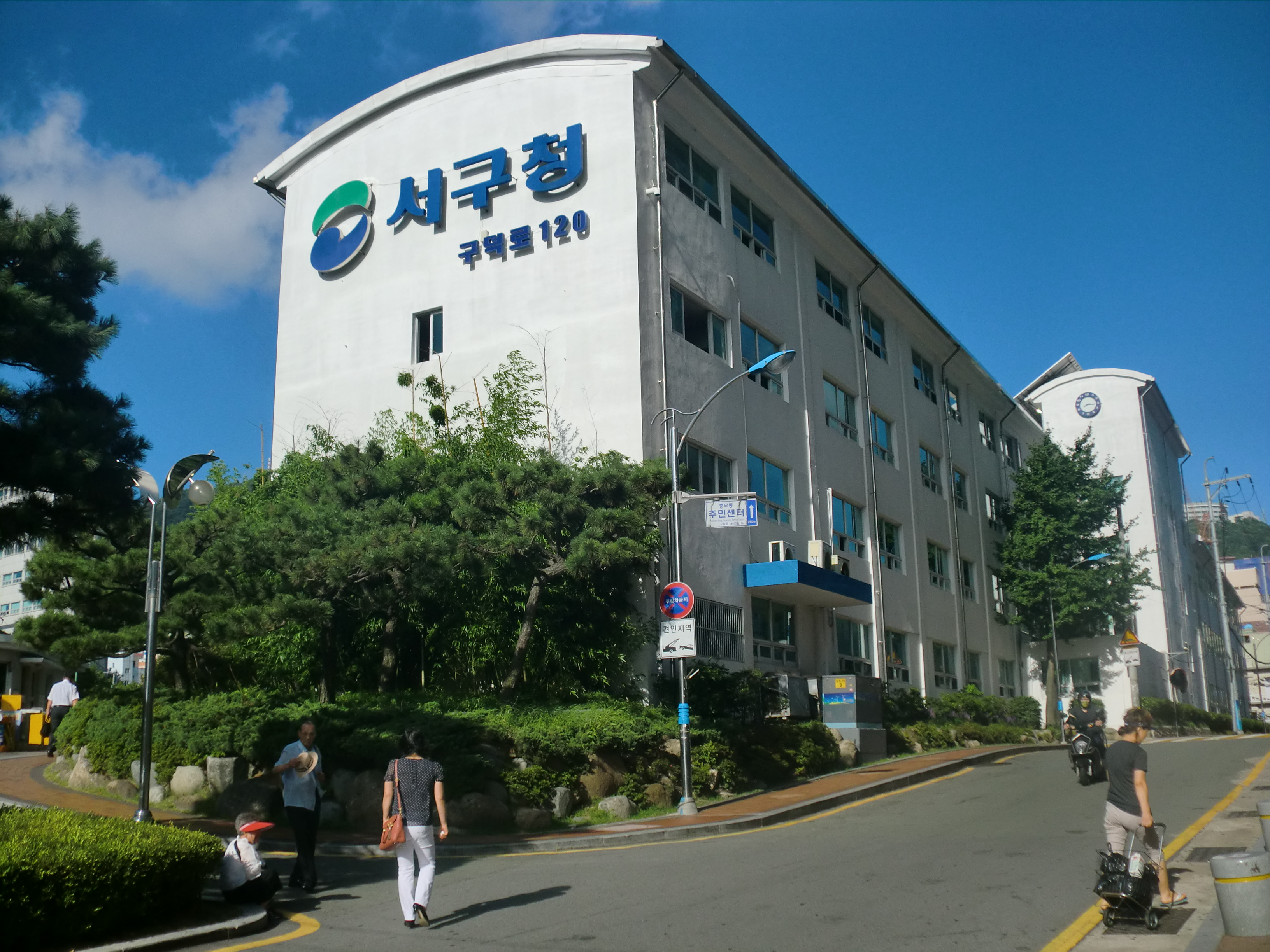 부산광역시 서구에 있는 서구청